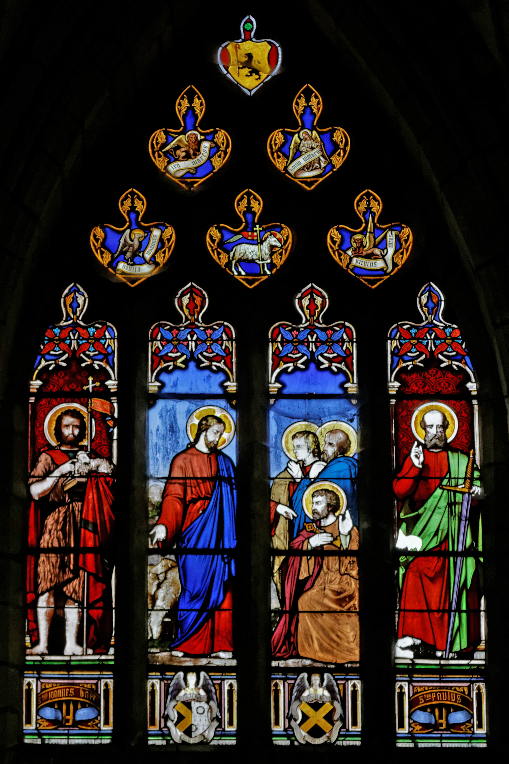 Vitrail de Lobin (1868) au centre du chœur de la cathédrale Saint-Paul-Aurélien de Saint-Pol-de-Léon, représentant saint Jean-Baptiste (à gauche), une scène centrale de confession de saint Pierre (présence des Évangélistes et des Agneaux mystiques) et saint Paul (à droite).